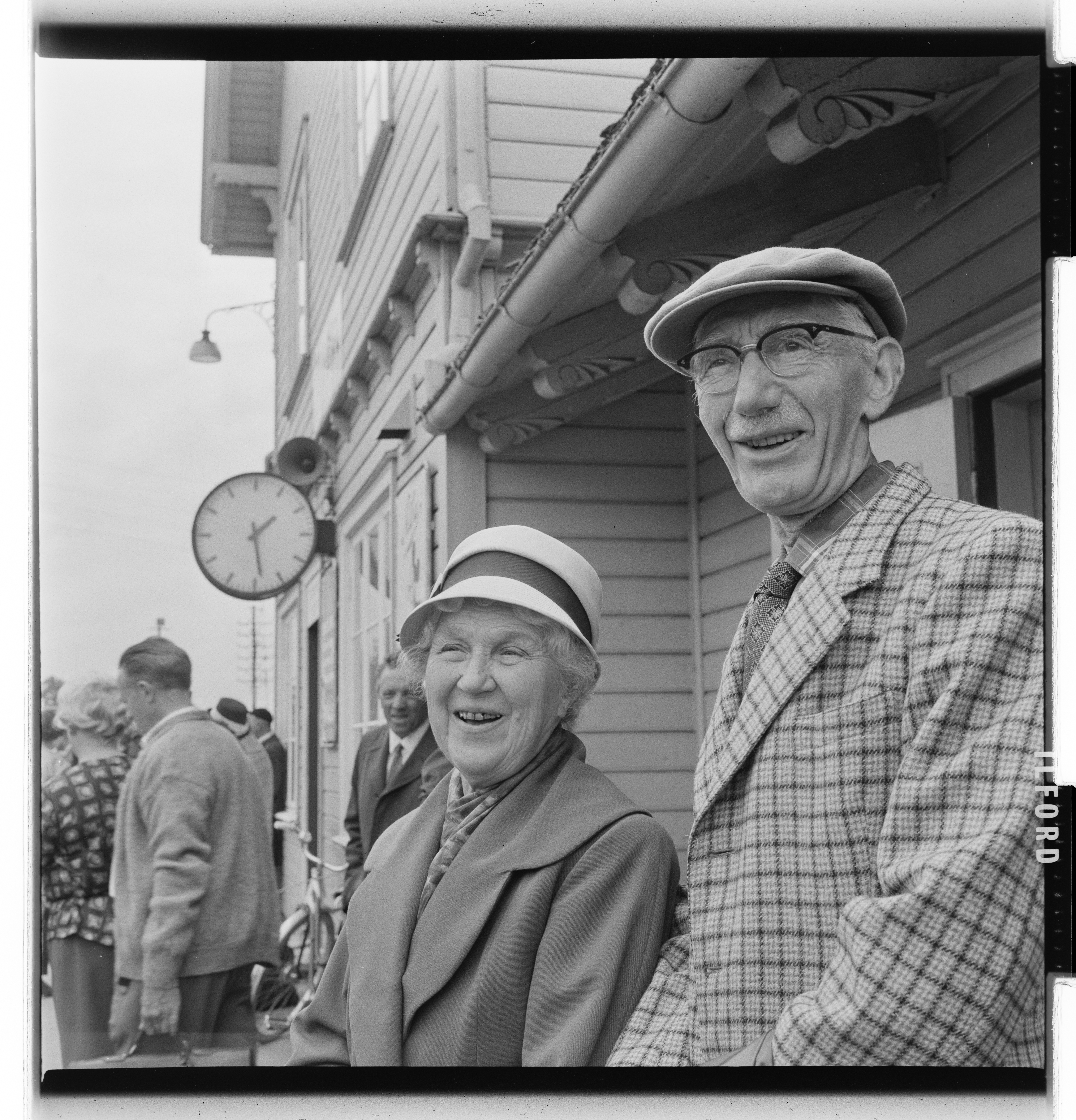 Bildet er hentet fra Arkivverket. Foto tatt i forbindelse med reportasje om den norske filmen Freske fraspark fra 1963. Manus var ved Kjell Aukrust og Bjørn Breigutu. Regi ved Bjørn Breigutu. Kjell Aukrust, Leif Juster, Turid Caldwell, Alfhild Hovdan, Per Bistrup, Lalla Carlsen Arkivinstitusjon : Riksarkivet Arkivnavn : Billedbladet NÅ Sted : Norge, Hedmark, Alvdal, Emneord: Film, Filminnspilling, Kvinner, Menn Avbildet